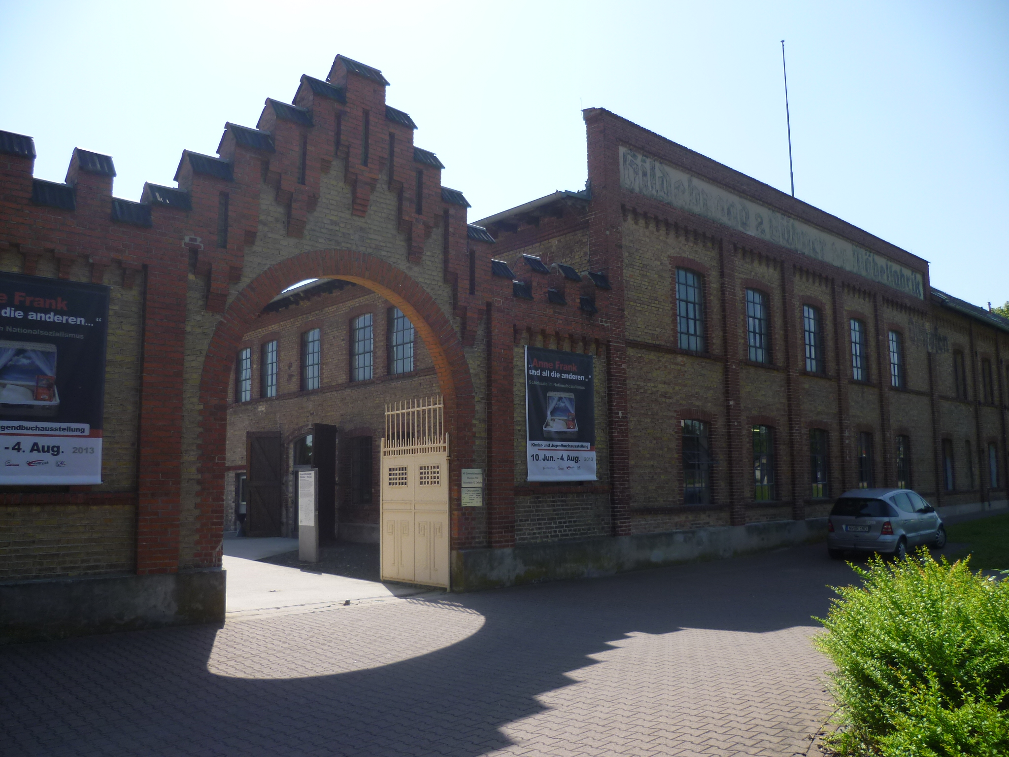 Eingang der Gedenkstätte KZ Osthofen